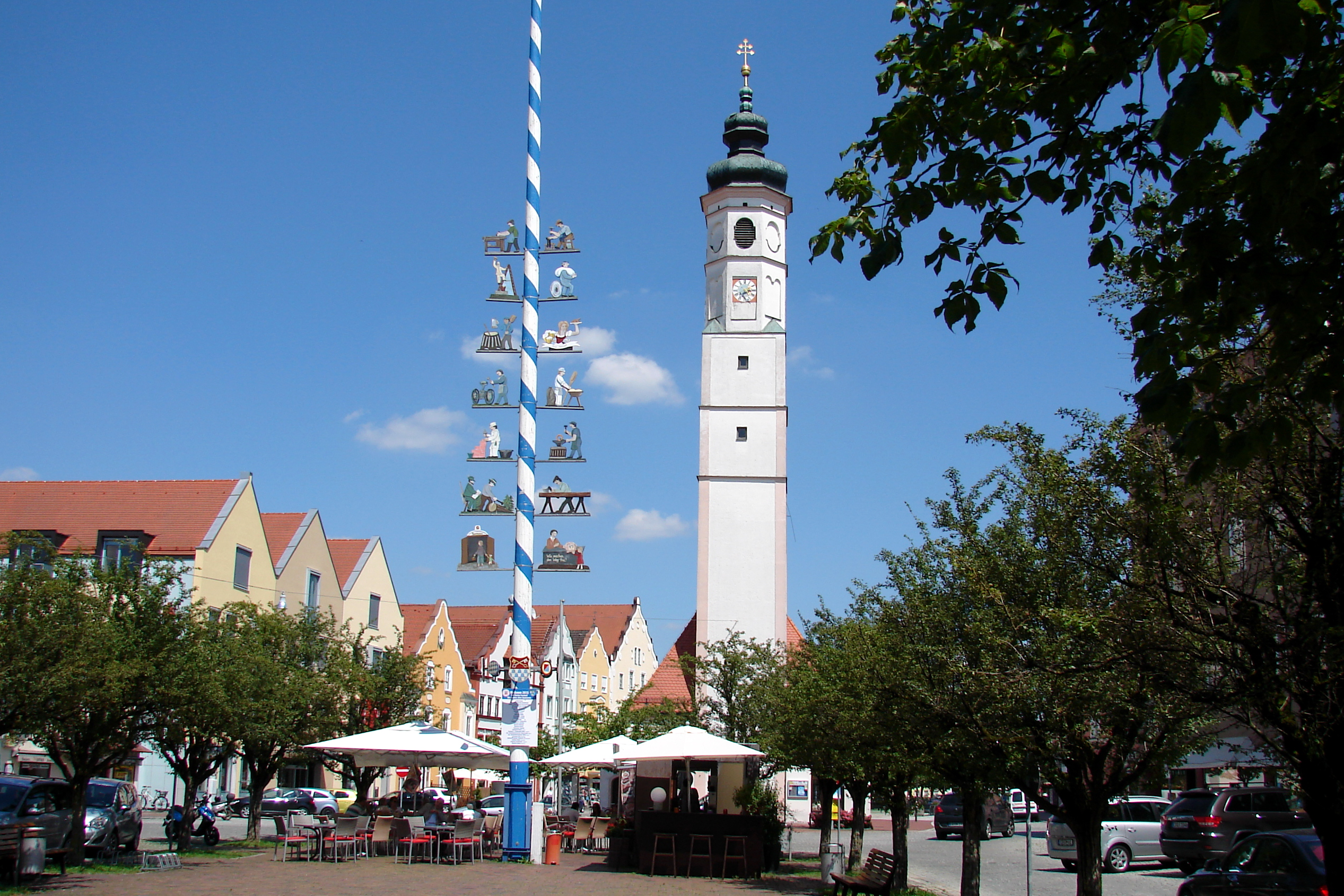 Kreuzförmiger Marktplatz von Dorfen